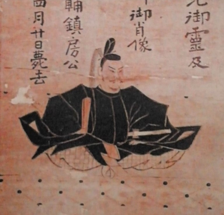 城井鎮房の肖像。